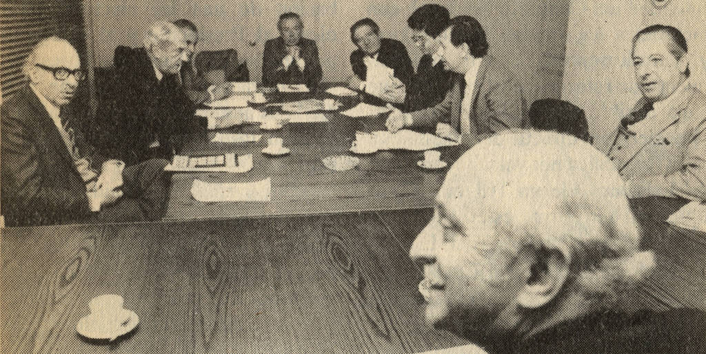 Organización de la Alianza Democrática (AD), 6 de agosto de 1983. Entre los asistentes se observa a René Abeliuk (primero de izquierda a derecha), Gabriel Valdés (segundo de izquierda a derecha) y Ricardo Lagos (séptimo de izquierda a derecha)